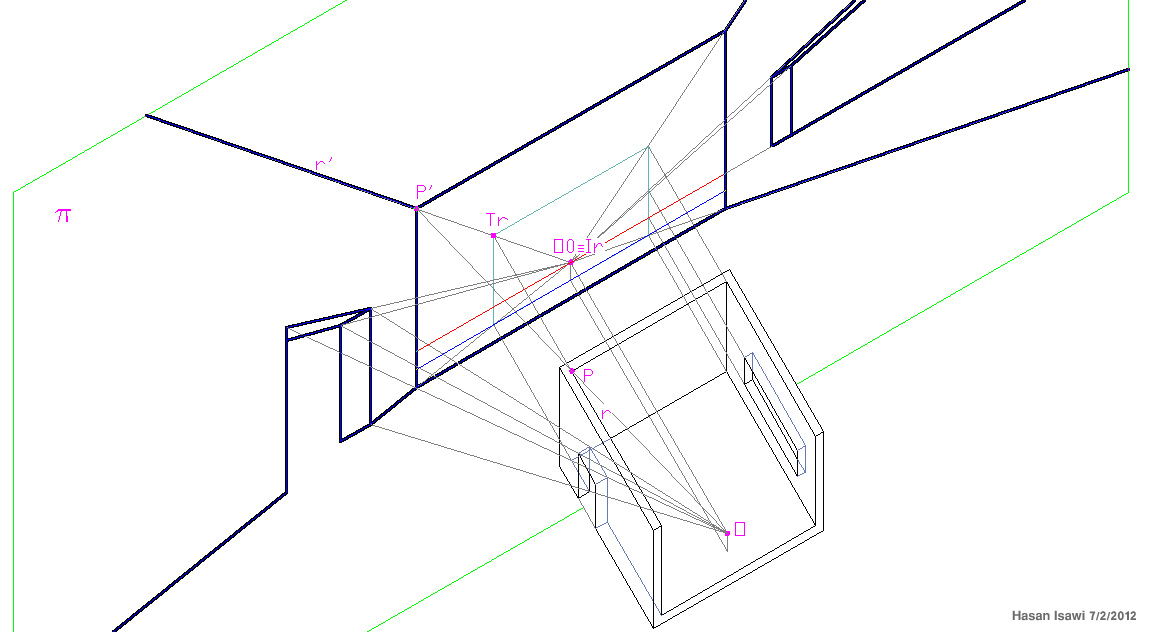 illustrazione assonometrica della genesi spaziale della prospettiva centrale